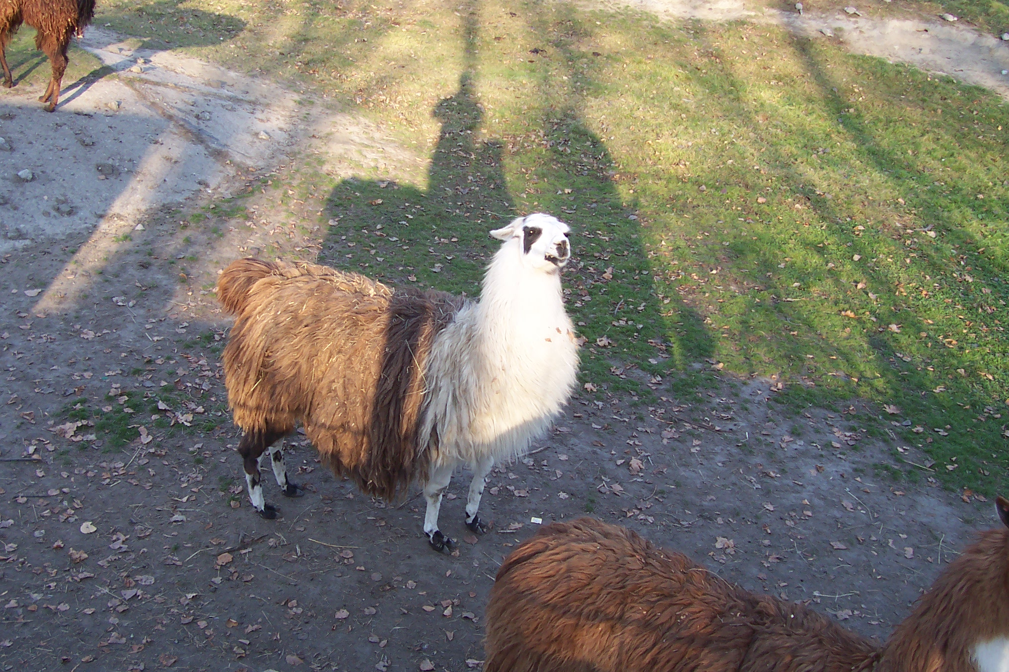 Llama in silesian zoo. Author : Krzysztof Blachnicki